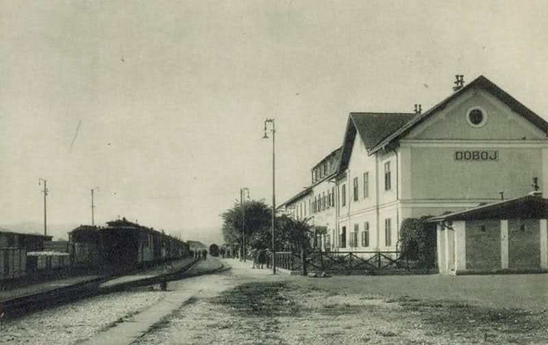 Der Bahnhof von Doboj war wegen der Abzweigung nach Tuzla eine wichtige Station der Bosnabahn.